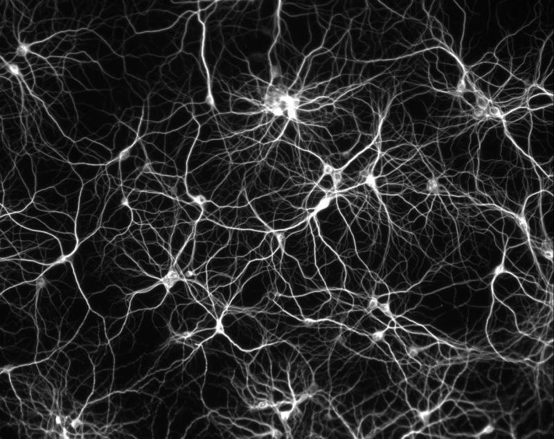 réseau de neurones humains